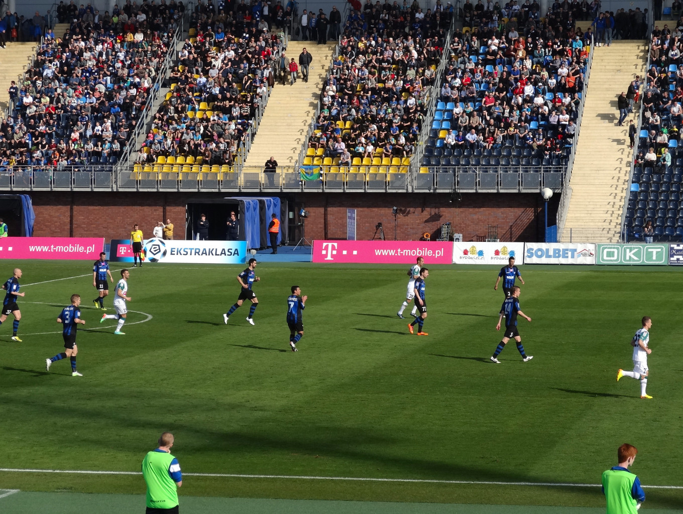 Mecz Ekstraklasy piłkarskiej Zawisza Bydgoszcz - Śląsk Wrocław 30 marca 2014 roku